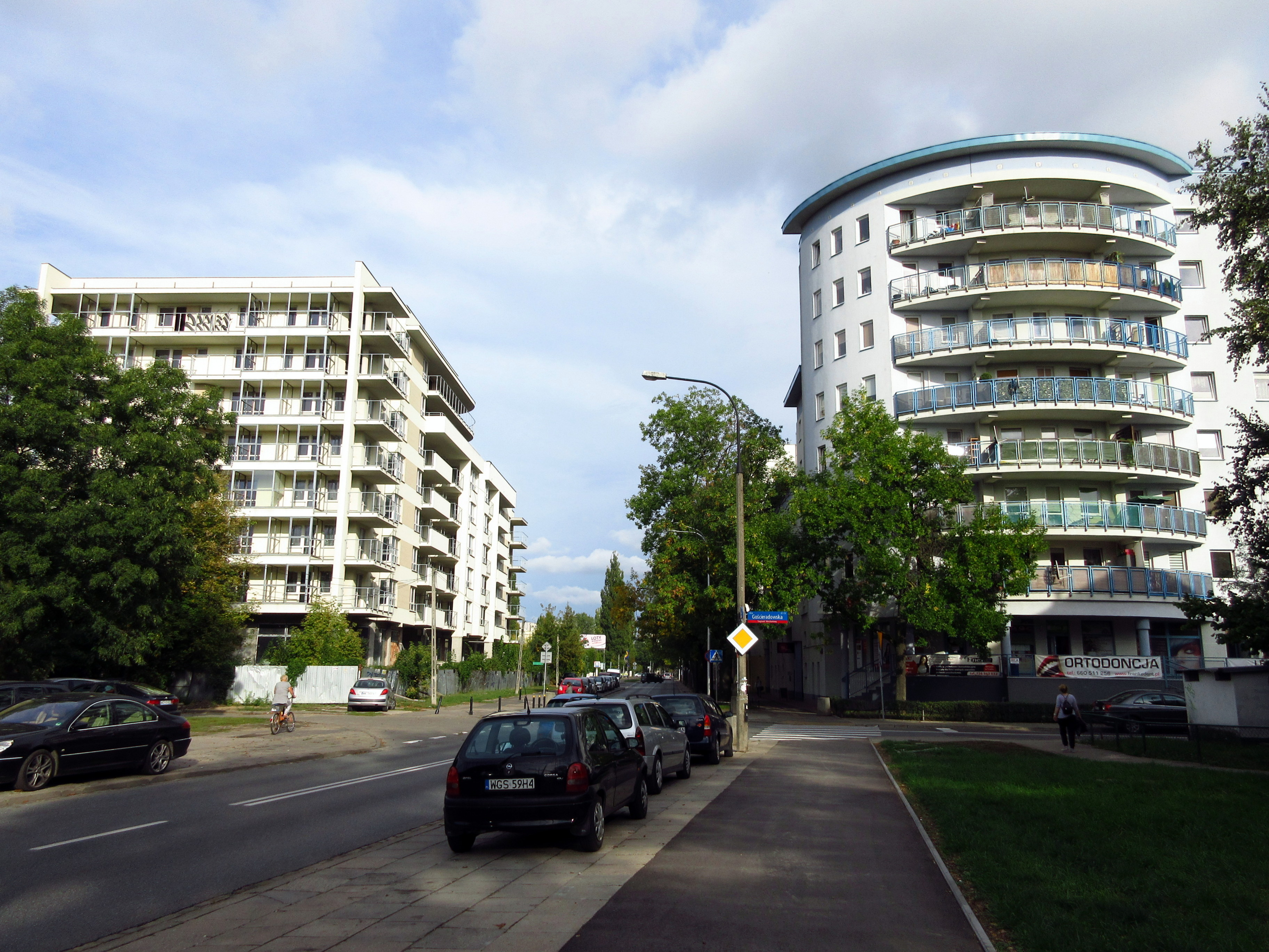 Widok od św. Wincentego w stronę Trockiej.